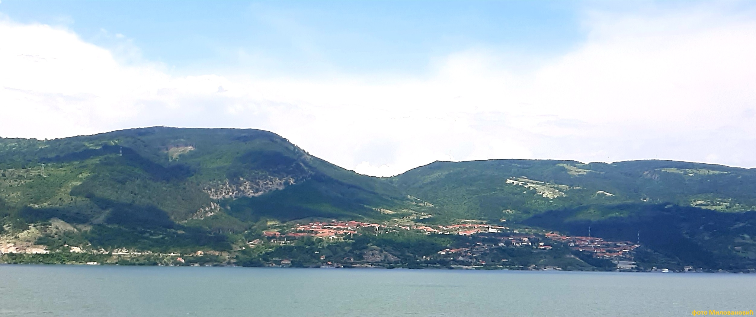 слика насеља Свињица у Румунији (Romanian: Svinița, Serbian: Свињица or Svinjica, Hungarian: Szinice)